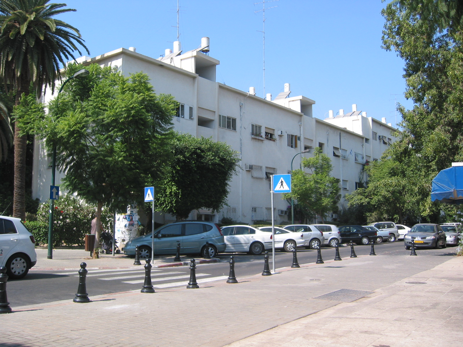 Kirait Meir, Tel Aviv